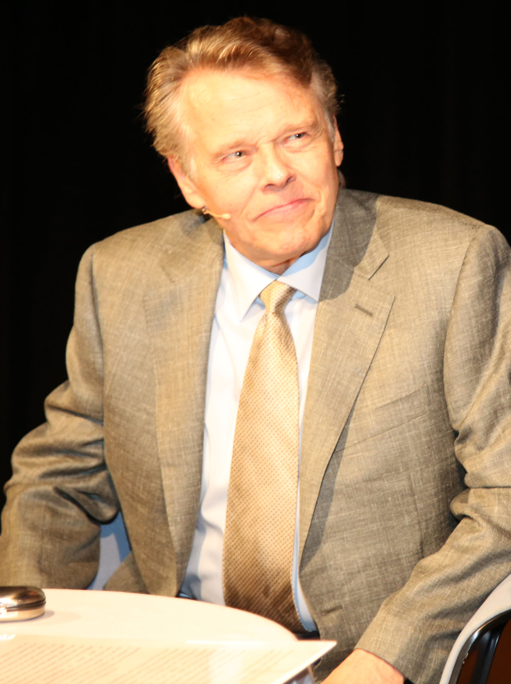 Maestro Mariss Jansons, wahrscheinlich bester lebender Dirigent